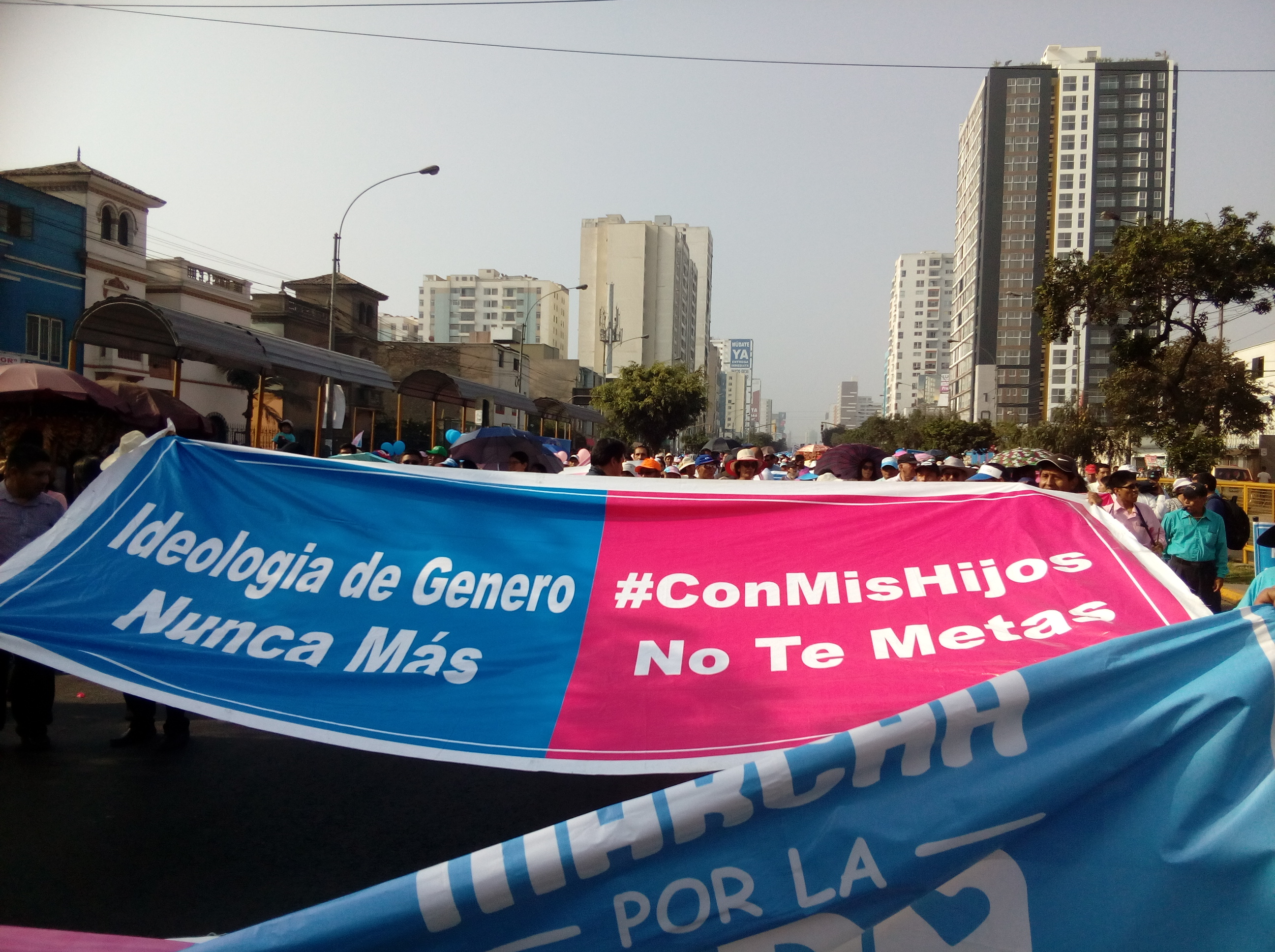 Manifestantes limeños (la mayoría del movimiento conservador Con mis Hijos no te Metas) en la Marcha por la Vida de 2018, Perú.